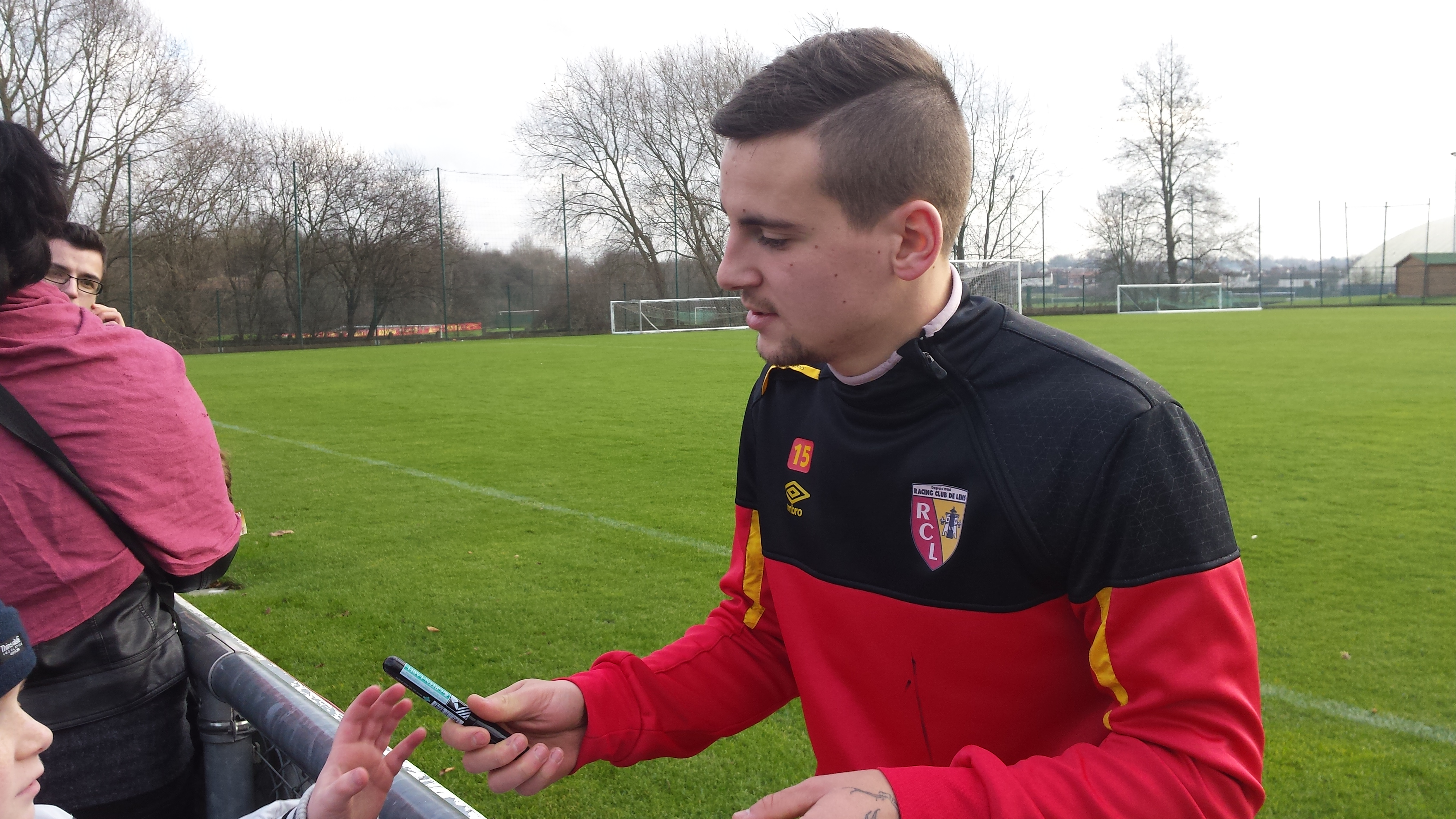 Patrick Fradj, après un entraînement public du Racing Club de Lens, le 31 décembre 2014, sur le terrain "San Siro" du Centre Technique et Sportif de La Gaillette.